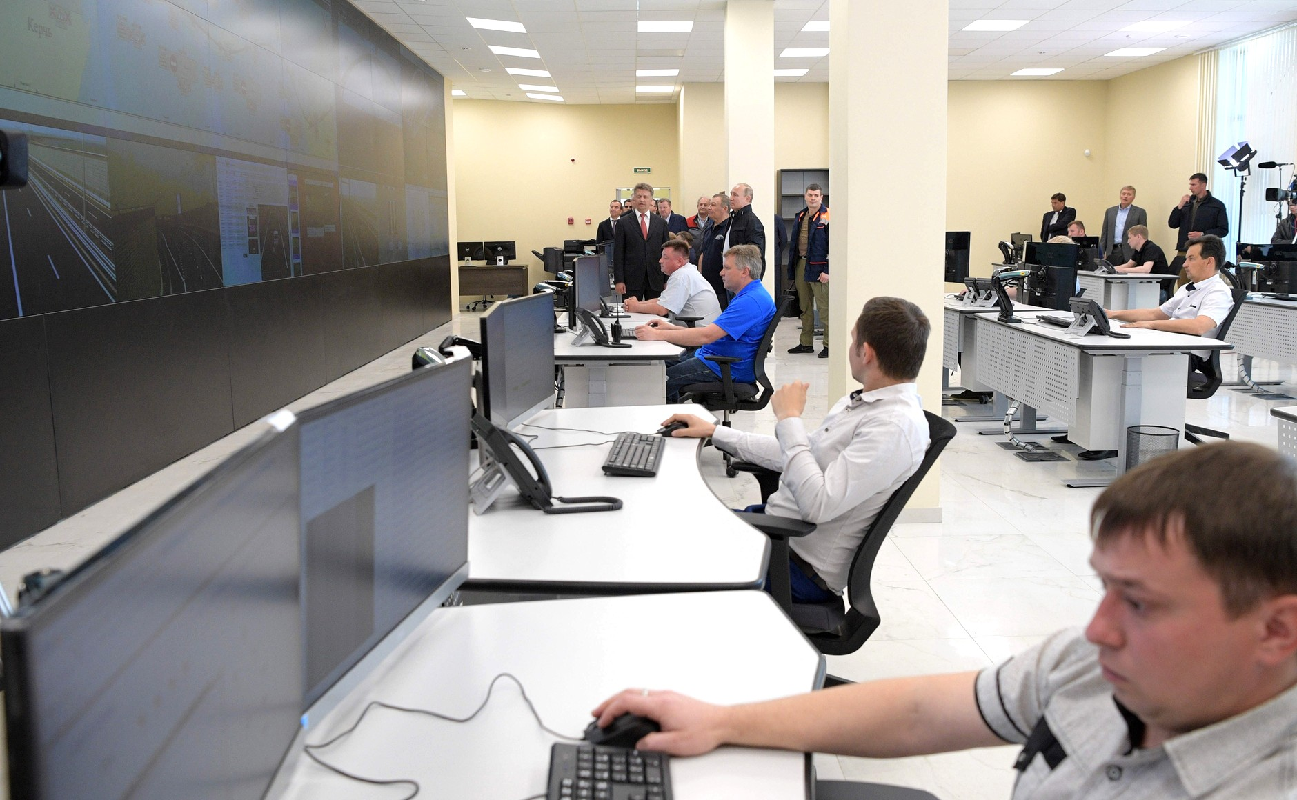 Открытие Крымского моста